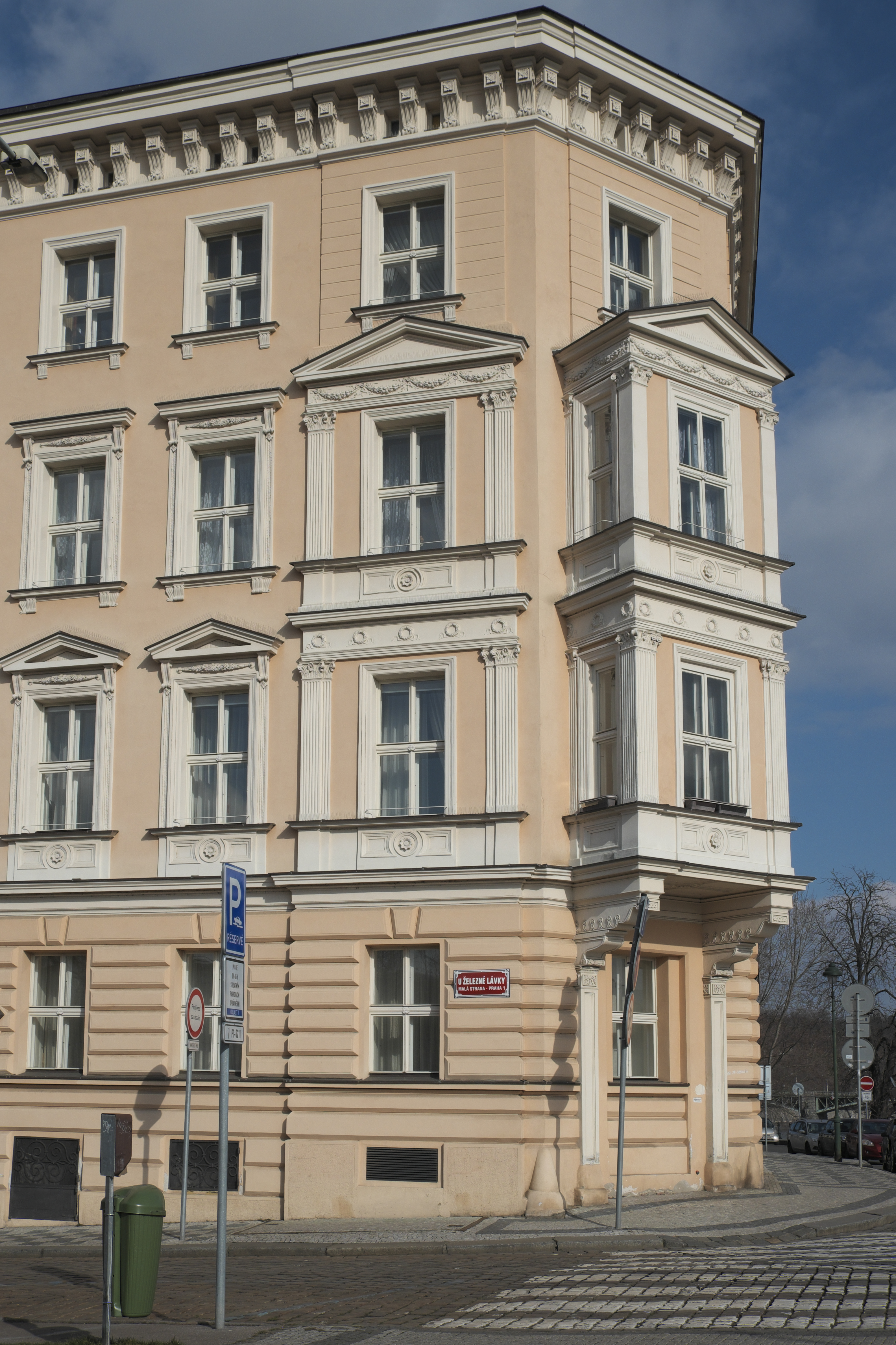 Gebäude am Platz Klárov, U železné lávky, auf der Kleinseite (Malá Strana) in Prag (Tschechien)